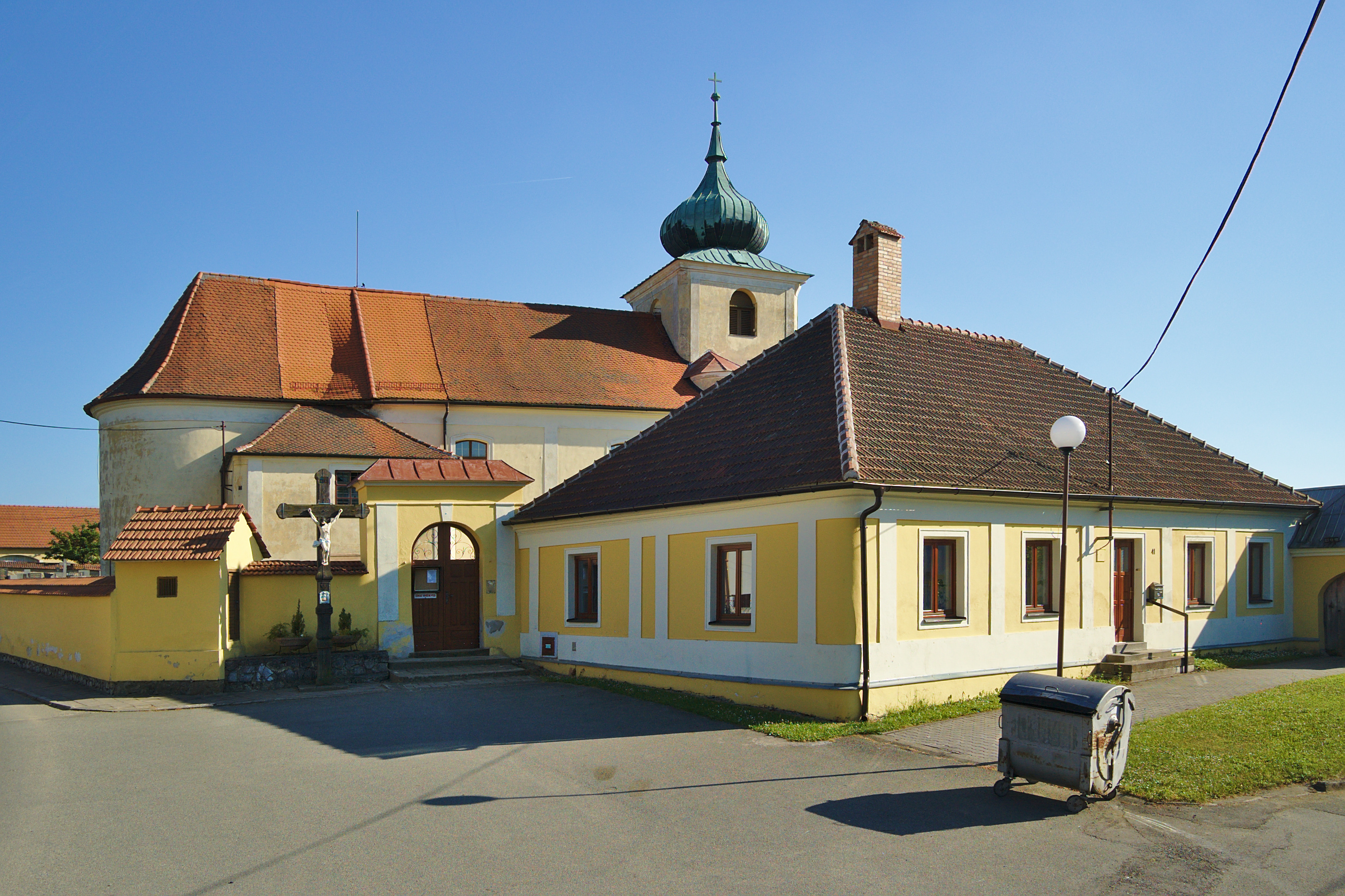 Kostel svatého Petra a Pavla, Petrovice, okres Blansko